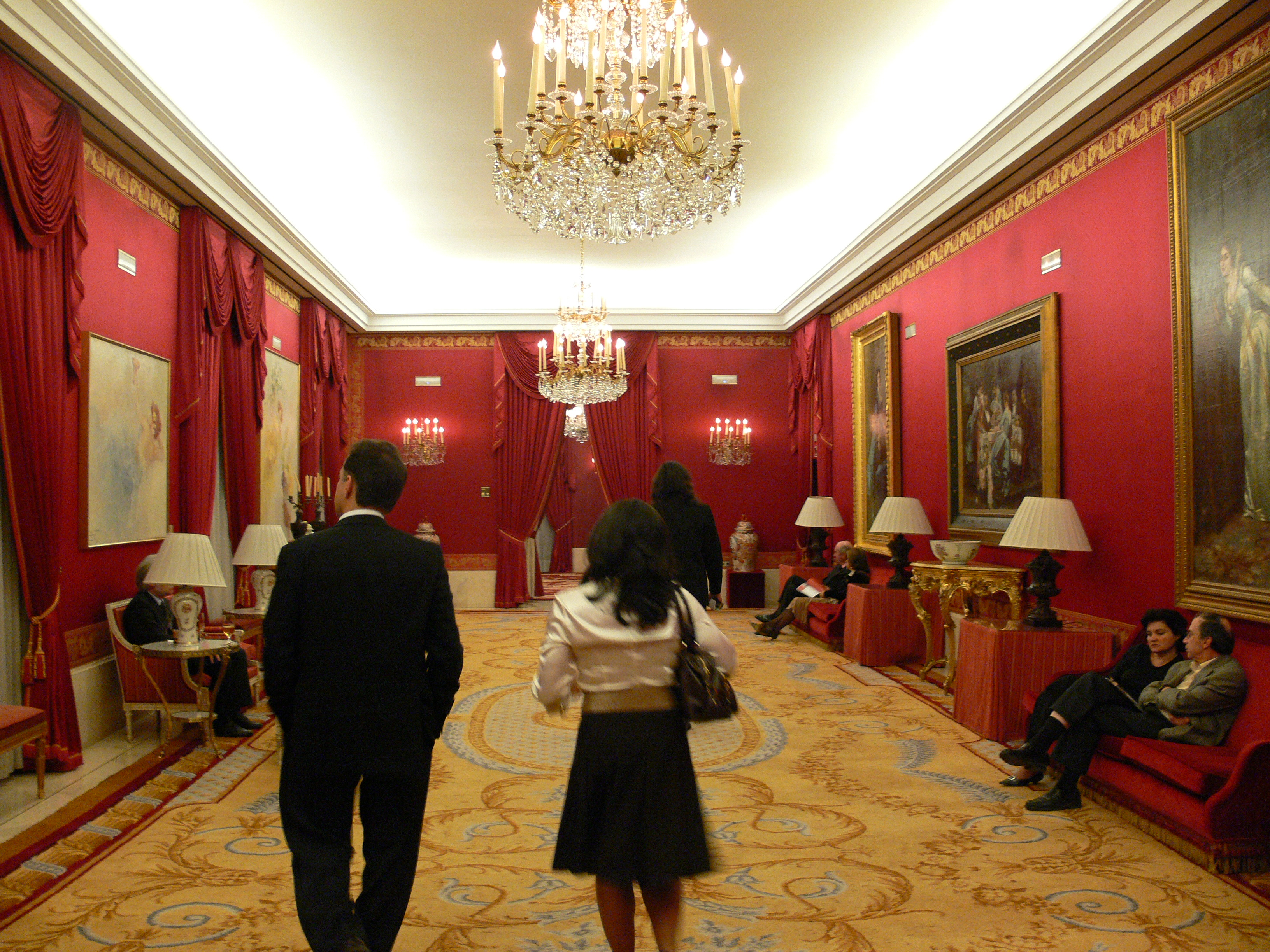 Teatro Real, Madrid: Salón Rojo (Red Room)